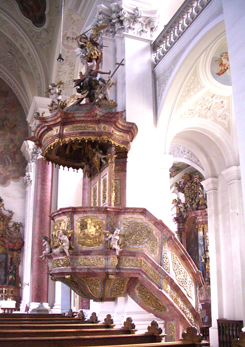 Ravensburg, Kloster Weißenau: Klosterkirche, Kanzel